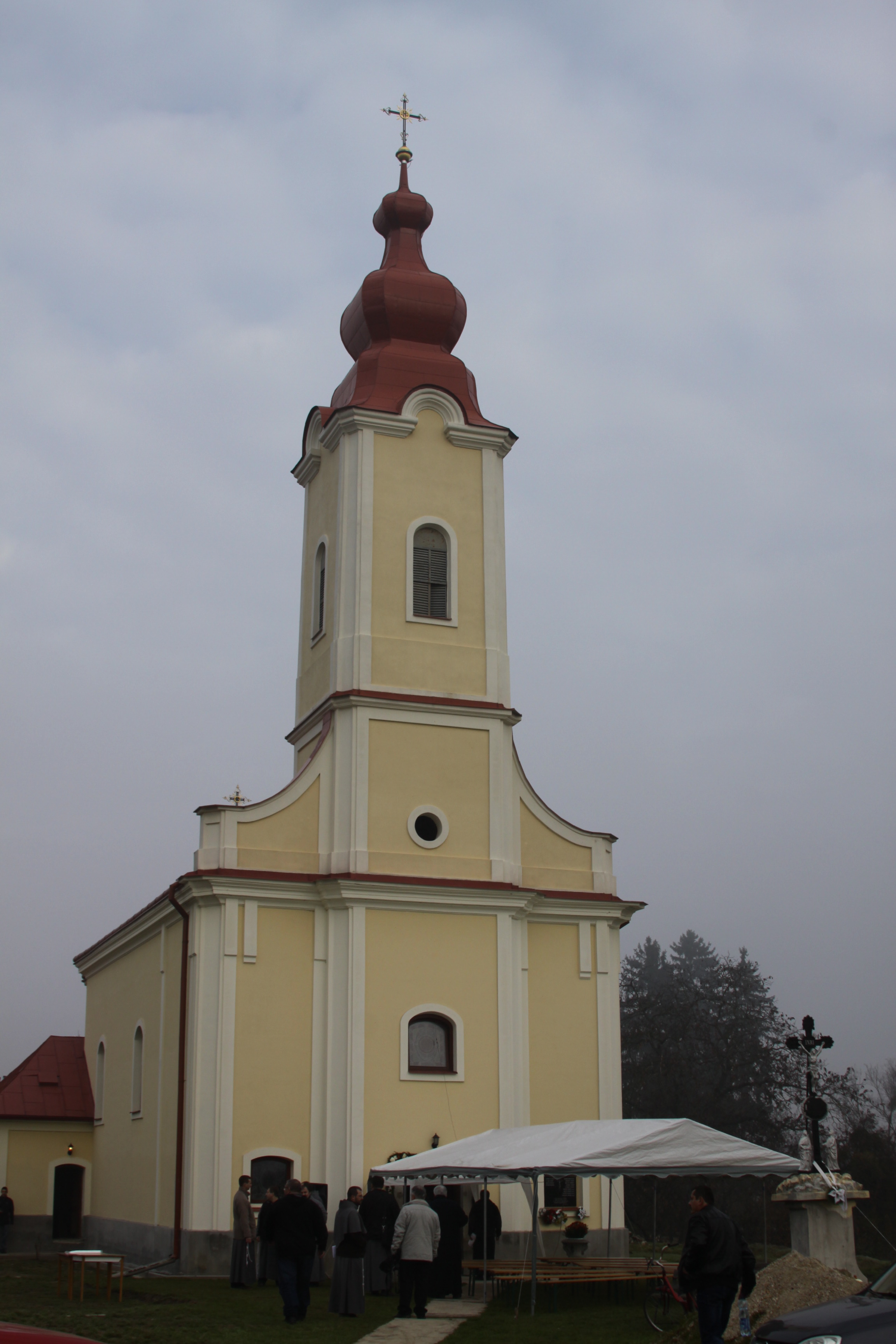 Kościół w Radzie na Słowacji koło granicy węgierskiej